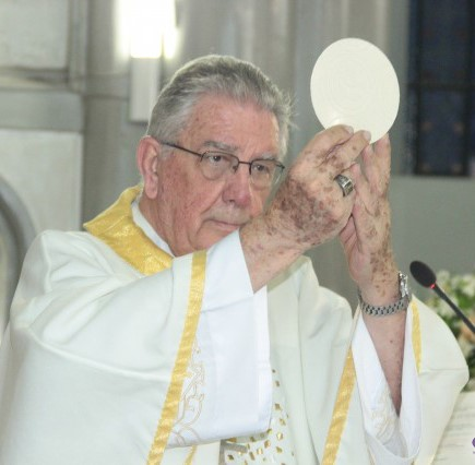 Mostra Dom Hugo no momento de Consagração do Corpo de Cisto